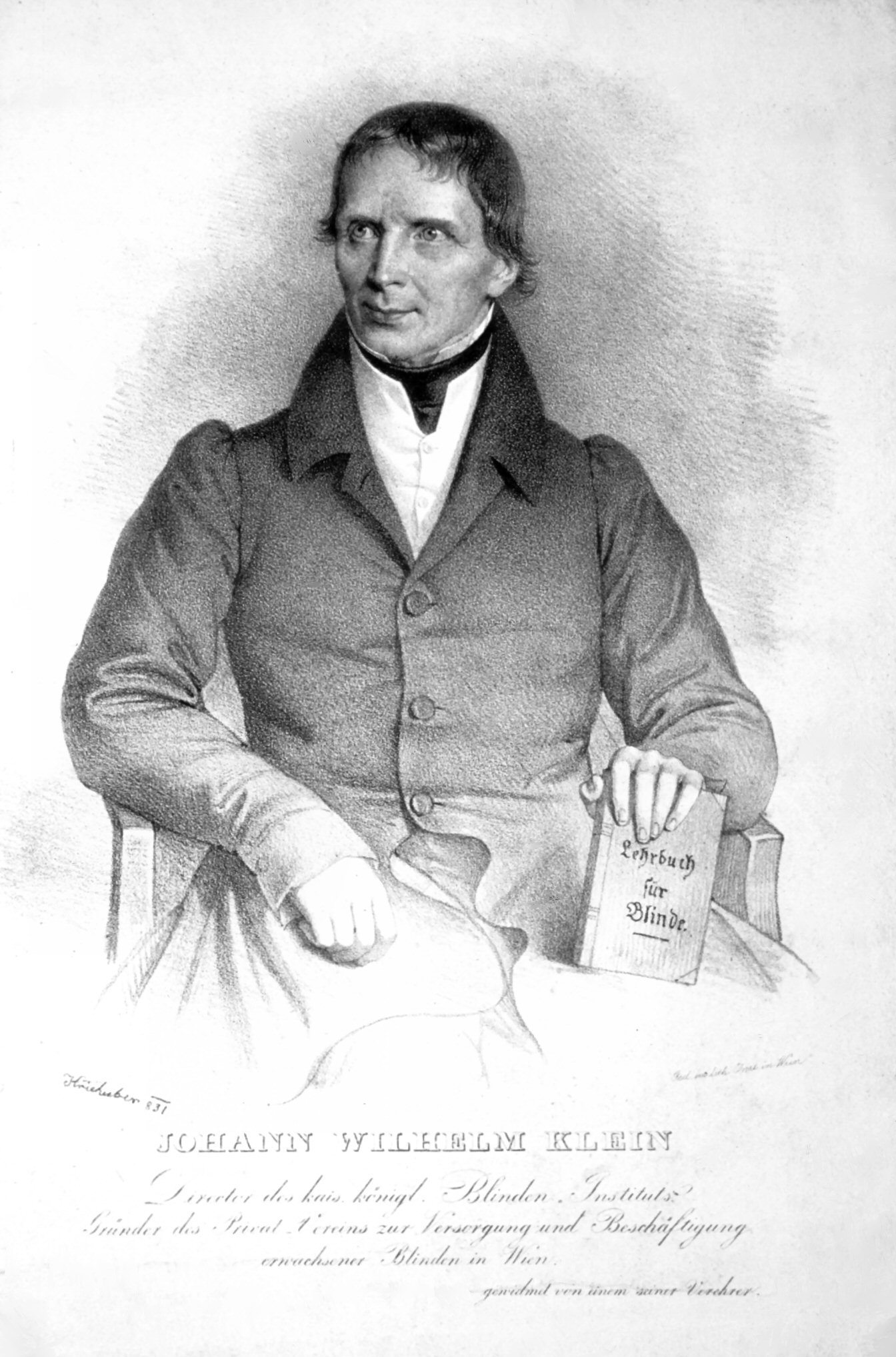 Portrait of Johann Wilhelm Klein